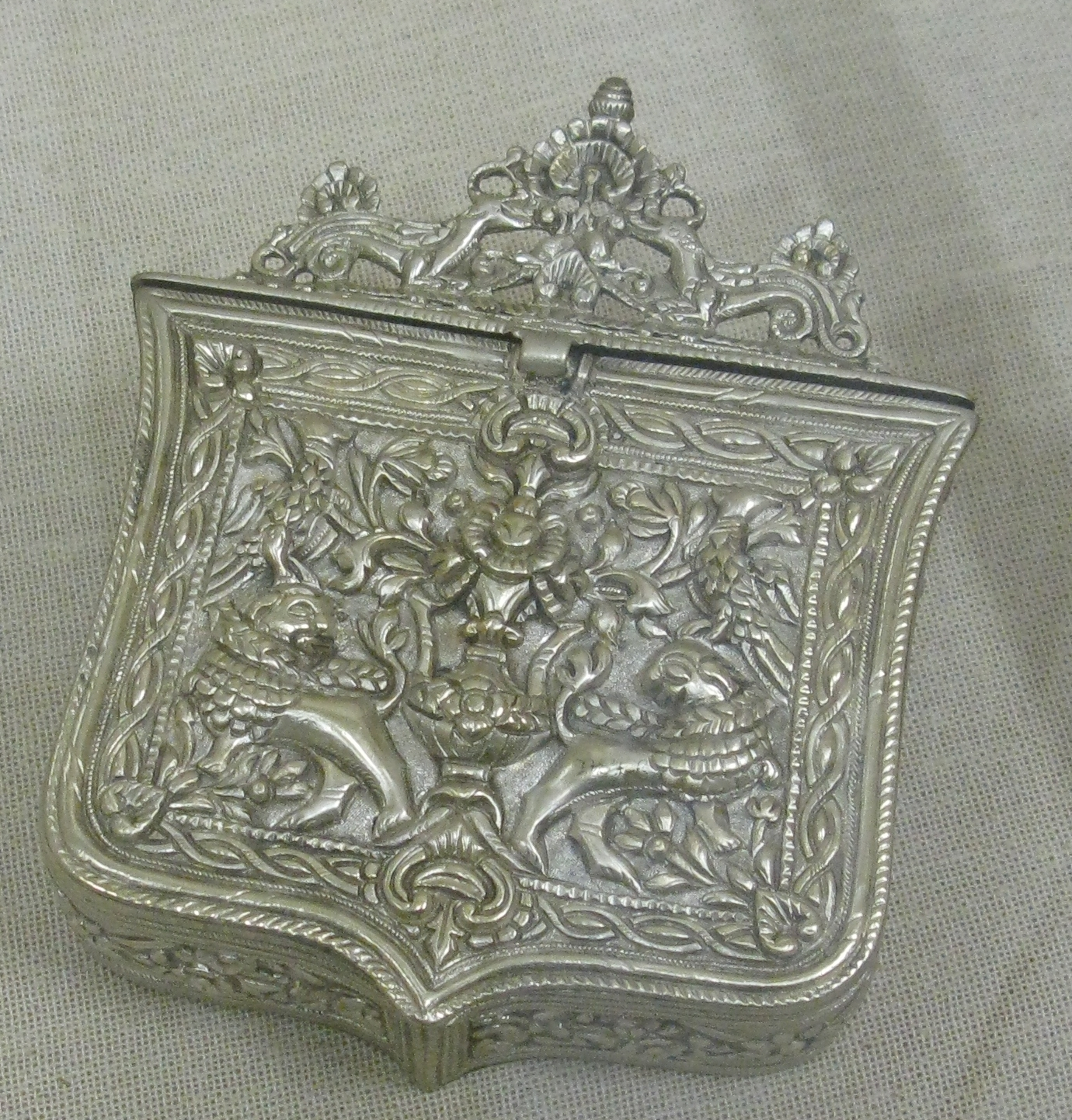 National Historical Museum, Athens, Greece --- Όπλα Ιωάννη Μακρυγιάννη. Εθνικό Ιστορικό Μουσείο. Αθήνα.